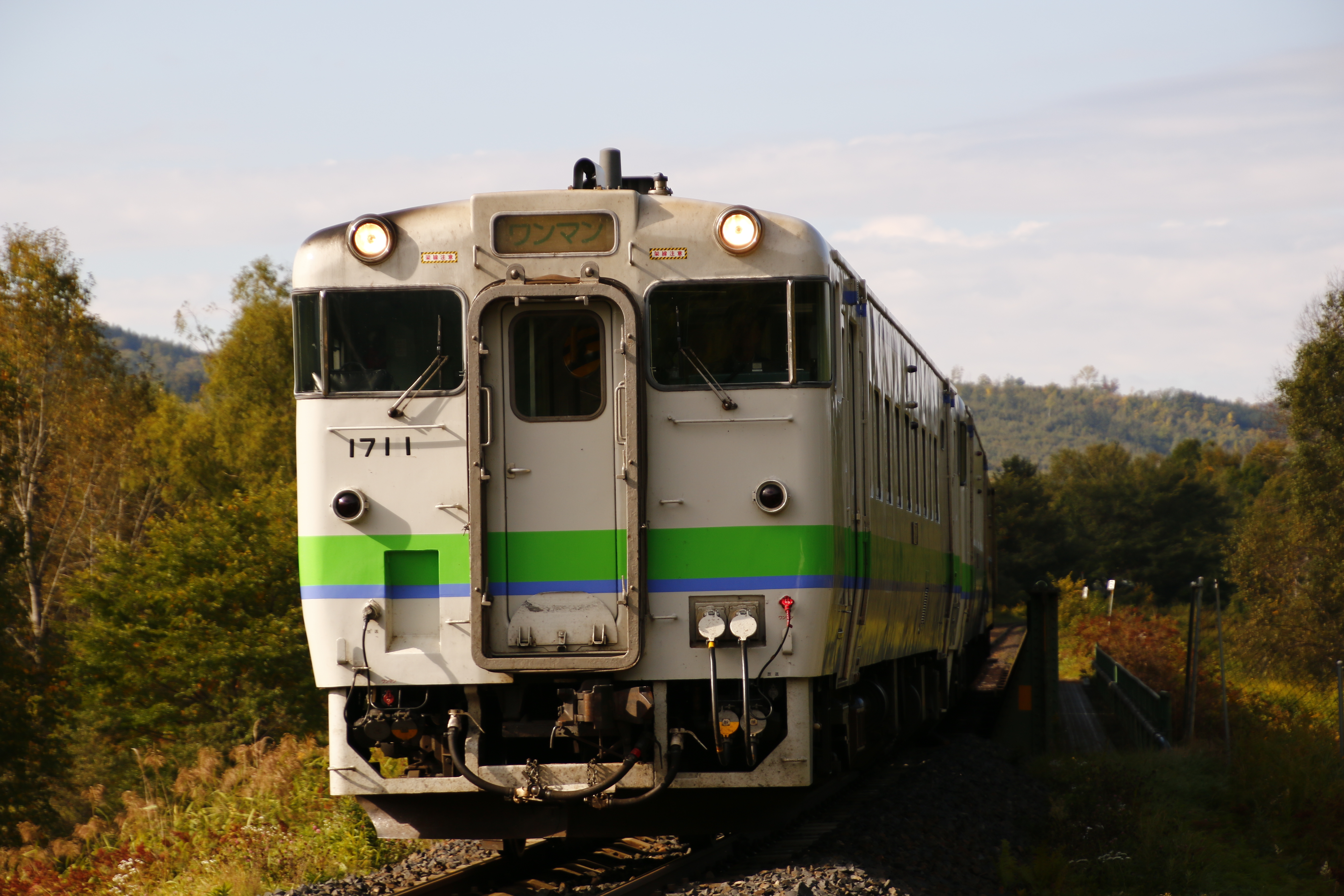 石北本線の朝の普通列車。キハ40系2両+キハ54系